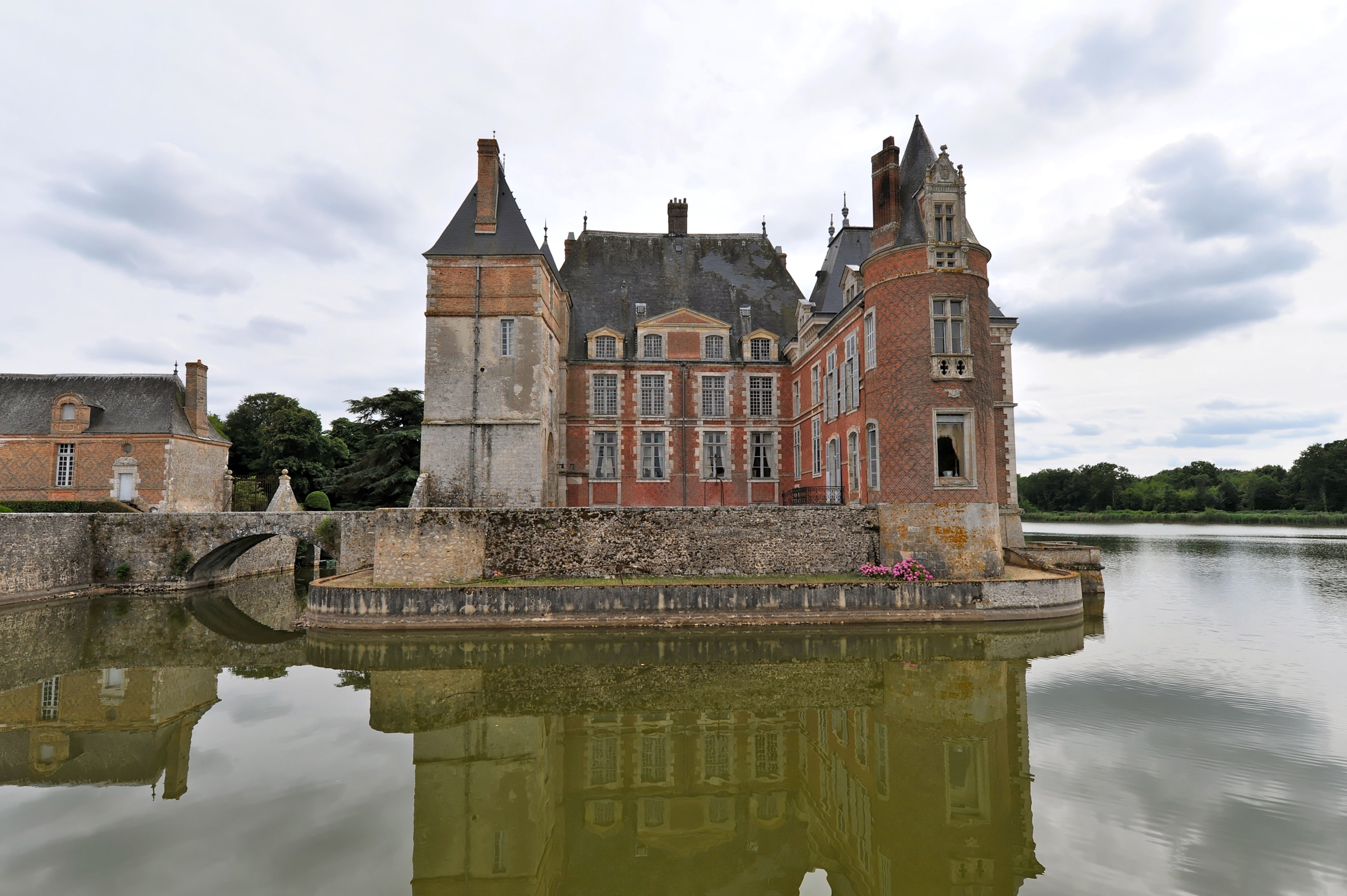 Le château de La Bussière